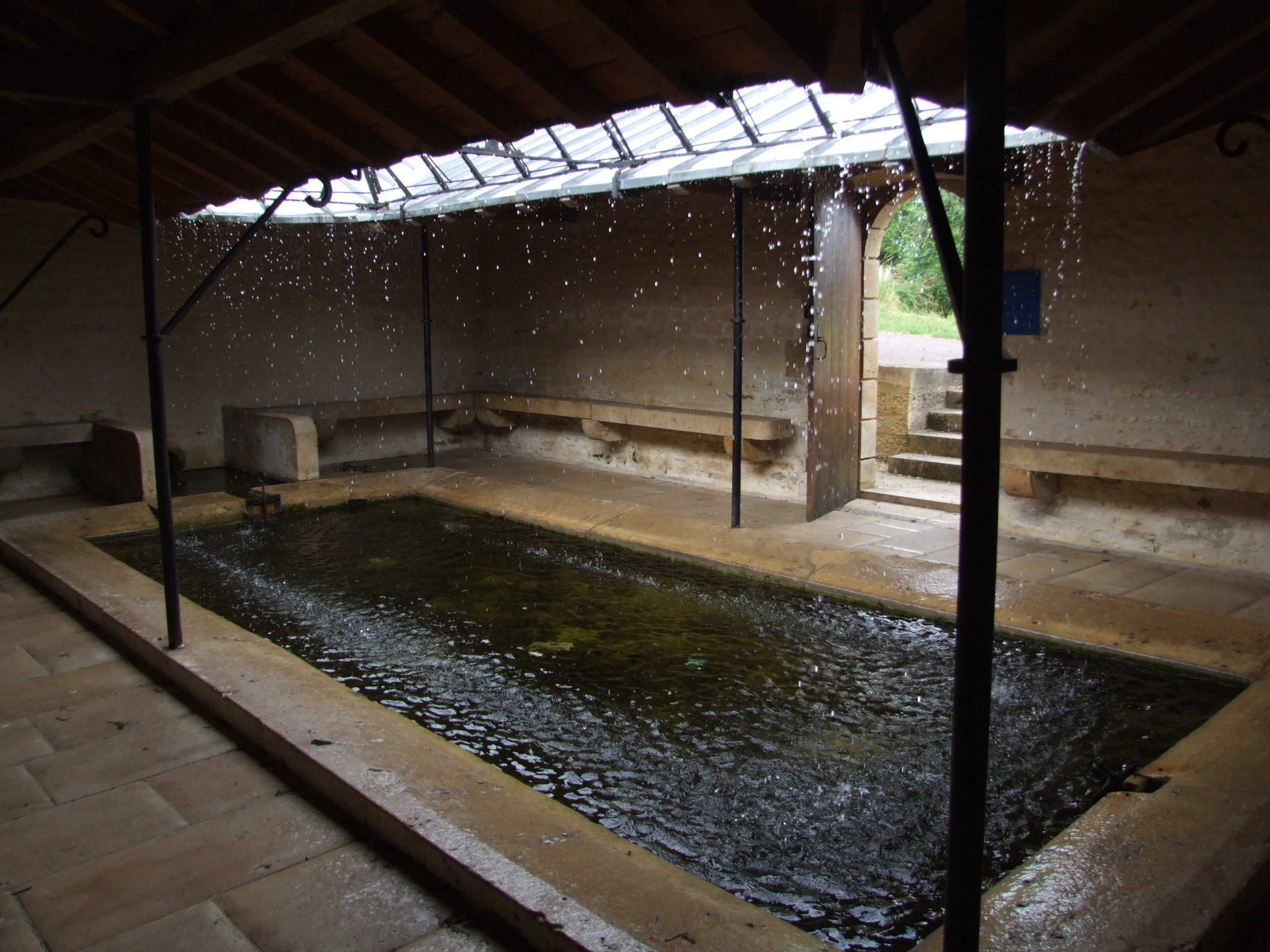 Lavoir de Baigneux-les-Juifs, Côte-d'Or, Bourgogne, FRANCE